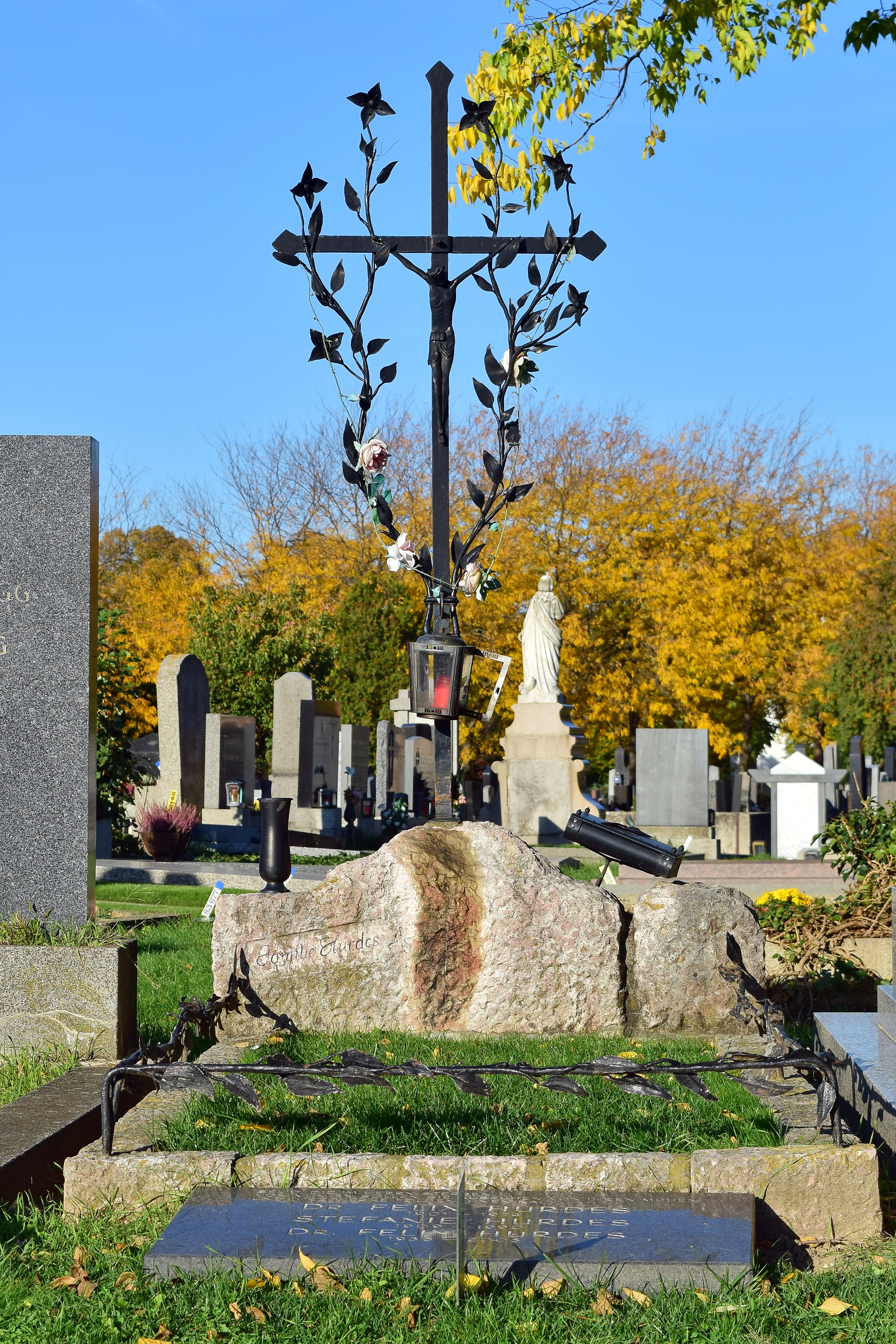 Ehrenhalber gewidmetes Grab von Felix Hurdes auf dem Wiener Zentralfriedhof.